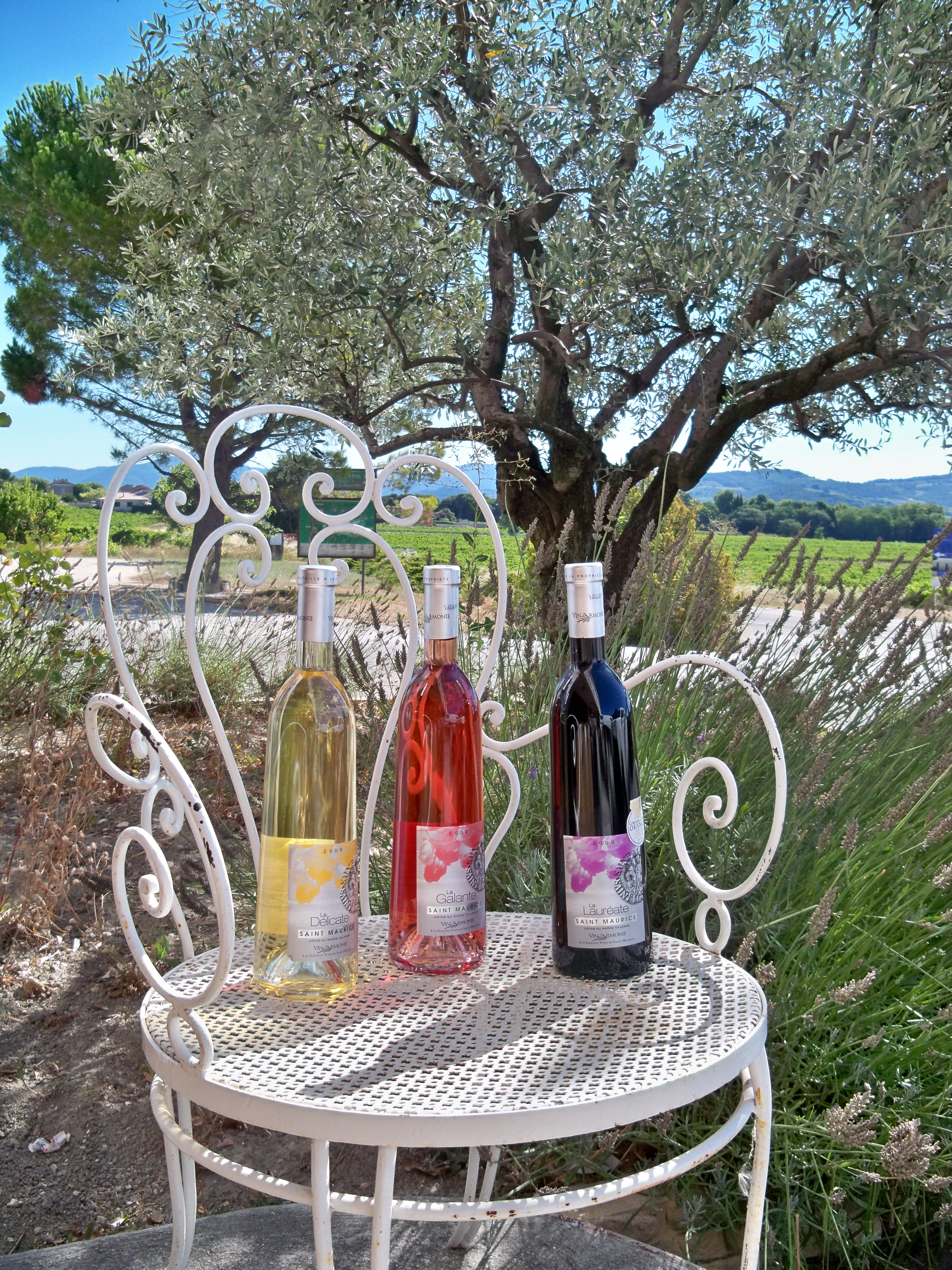 Bouteilles de Saint Maurice (Drôme) en 3 couleurs : Rouge, Rosé, Blanc